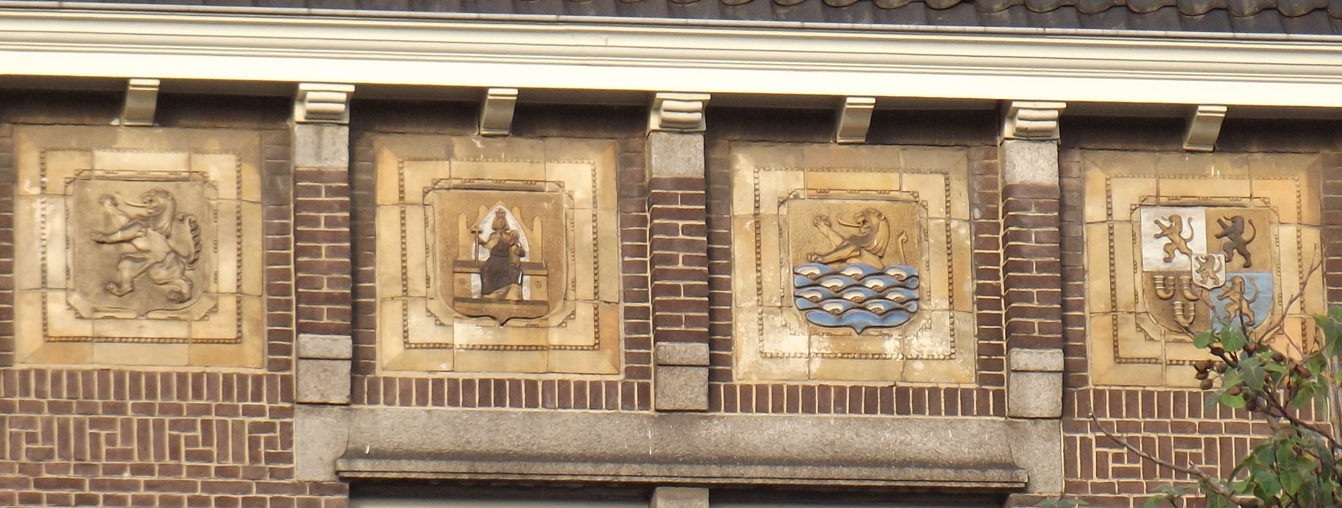 Heraldieke tegels bij Maastricht station. Dit zijn de provincies Zuid-Holland, Drenthe, Zeeland, Limburg en Noord-Brabant.